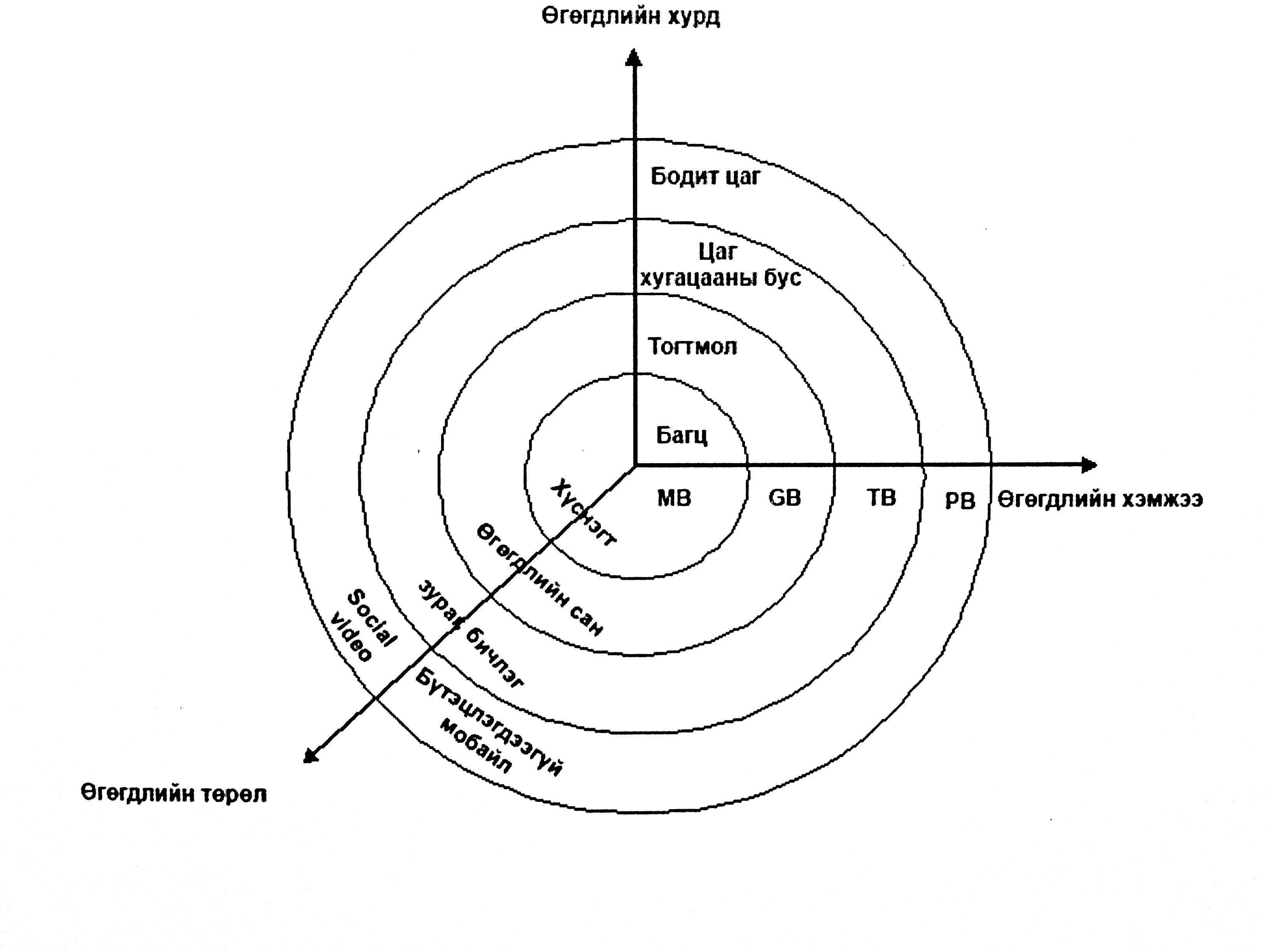 Монгол: Их өгөгдлийг тодорхойлох гурван шинж